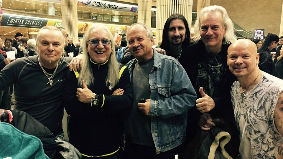 בני דודקביץ' עם חברי אוריה היפ